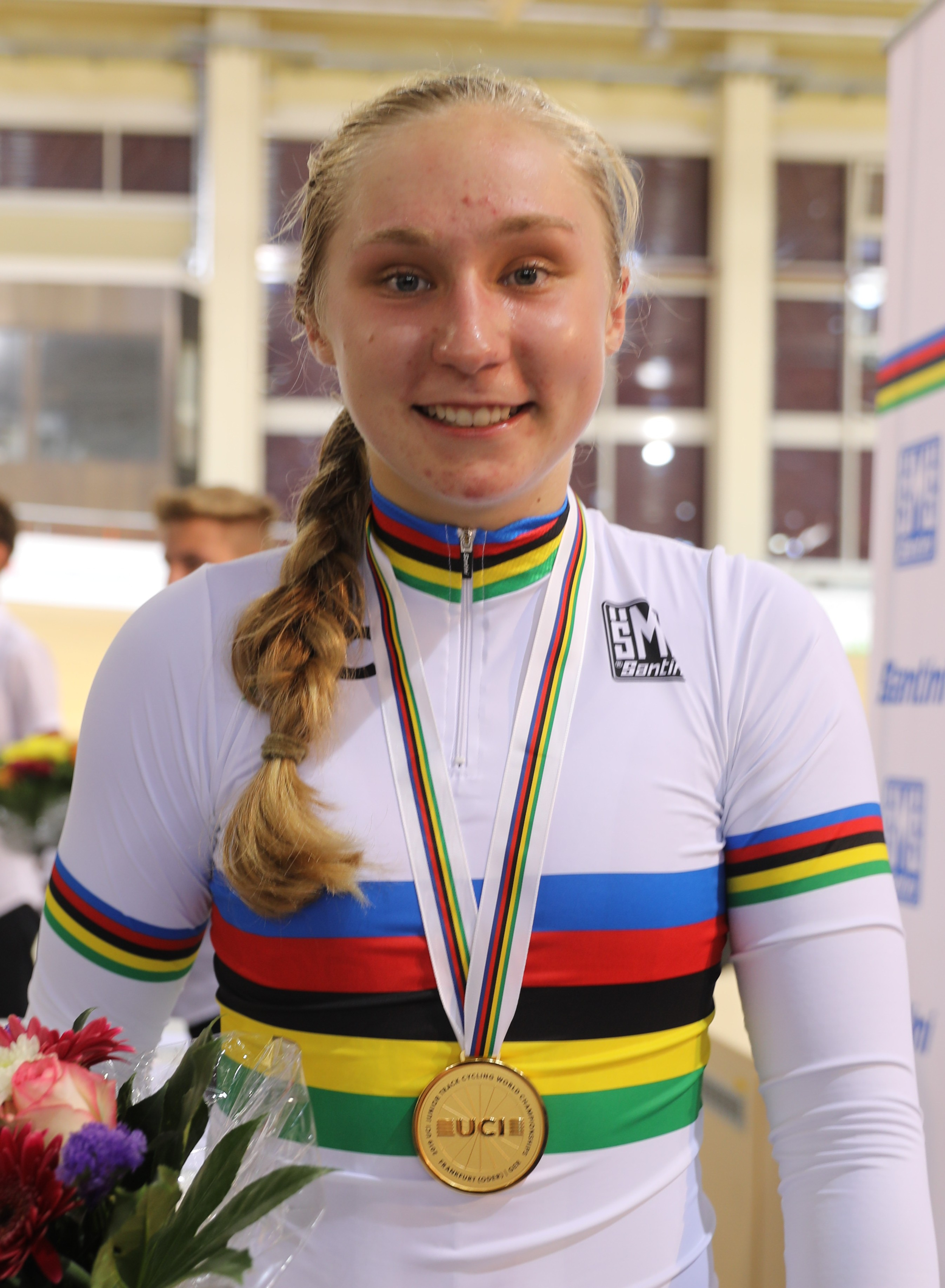 Megan Jastrab, Radsportlerin aus den USA - Gold im Omnium